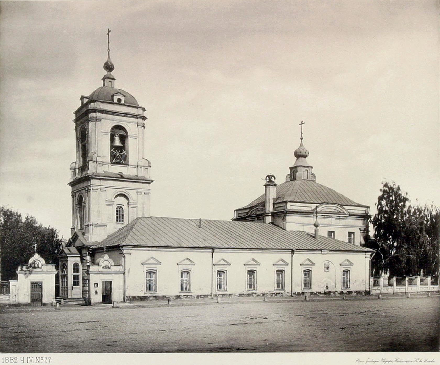 Храм Преображения Господня в Преображенском (разрушенный)